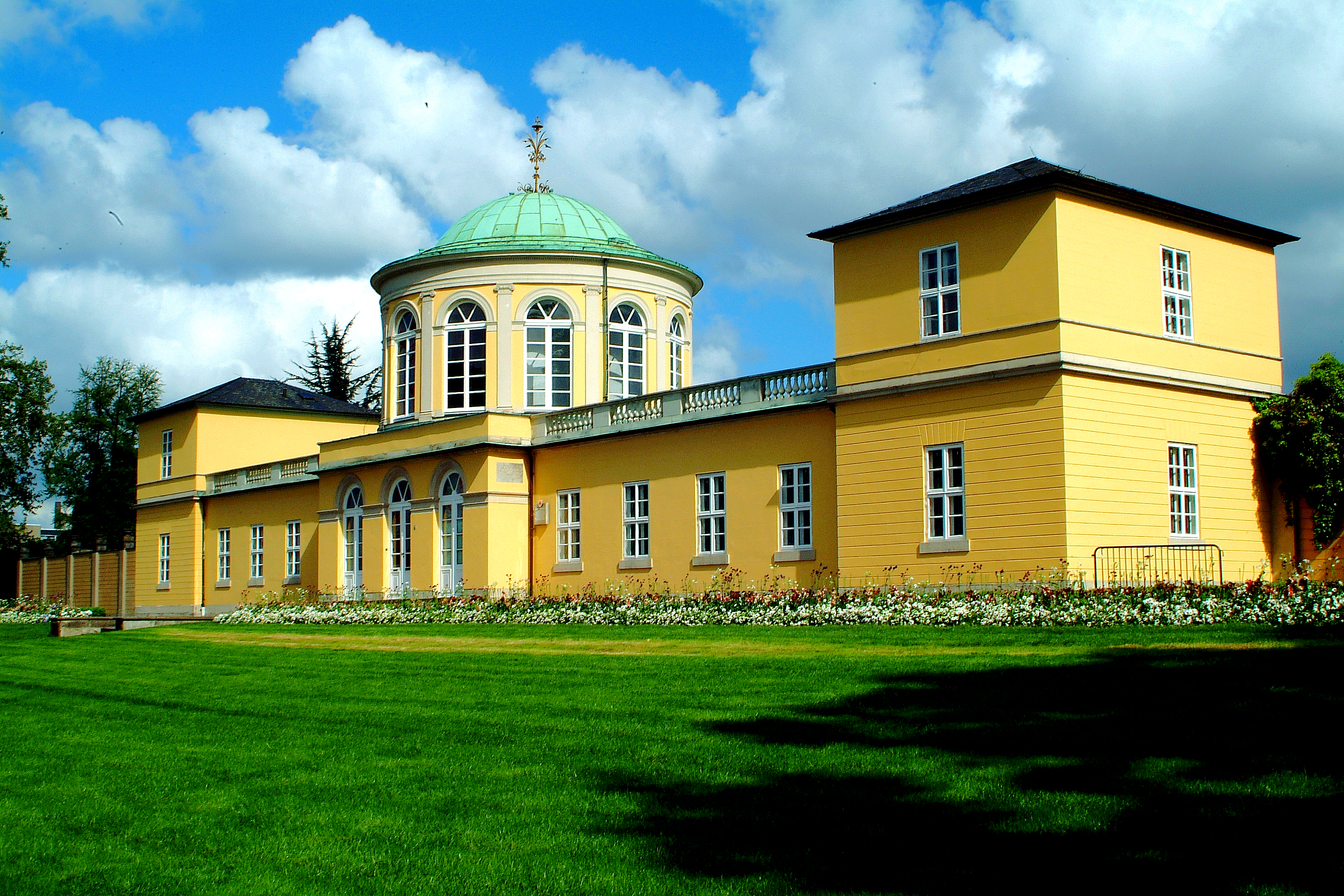 Der Bibliothekspavillon vor dem Berggarten, gesehen von der Herrenhäuser Straße